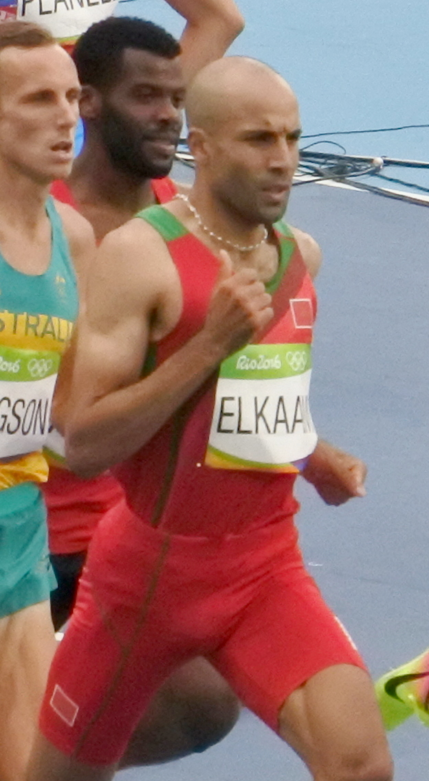 Rio 2016 - Eliminatórias 1500m Masculino